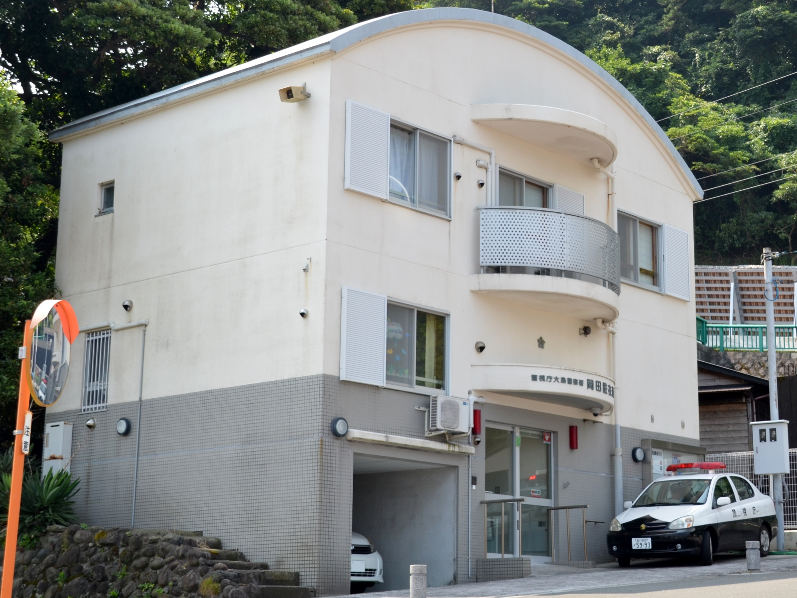 警視庁大島警察署岡田駐在所